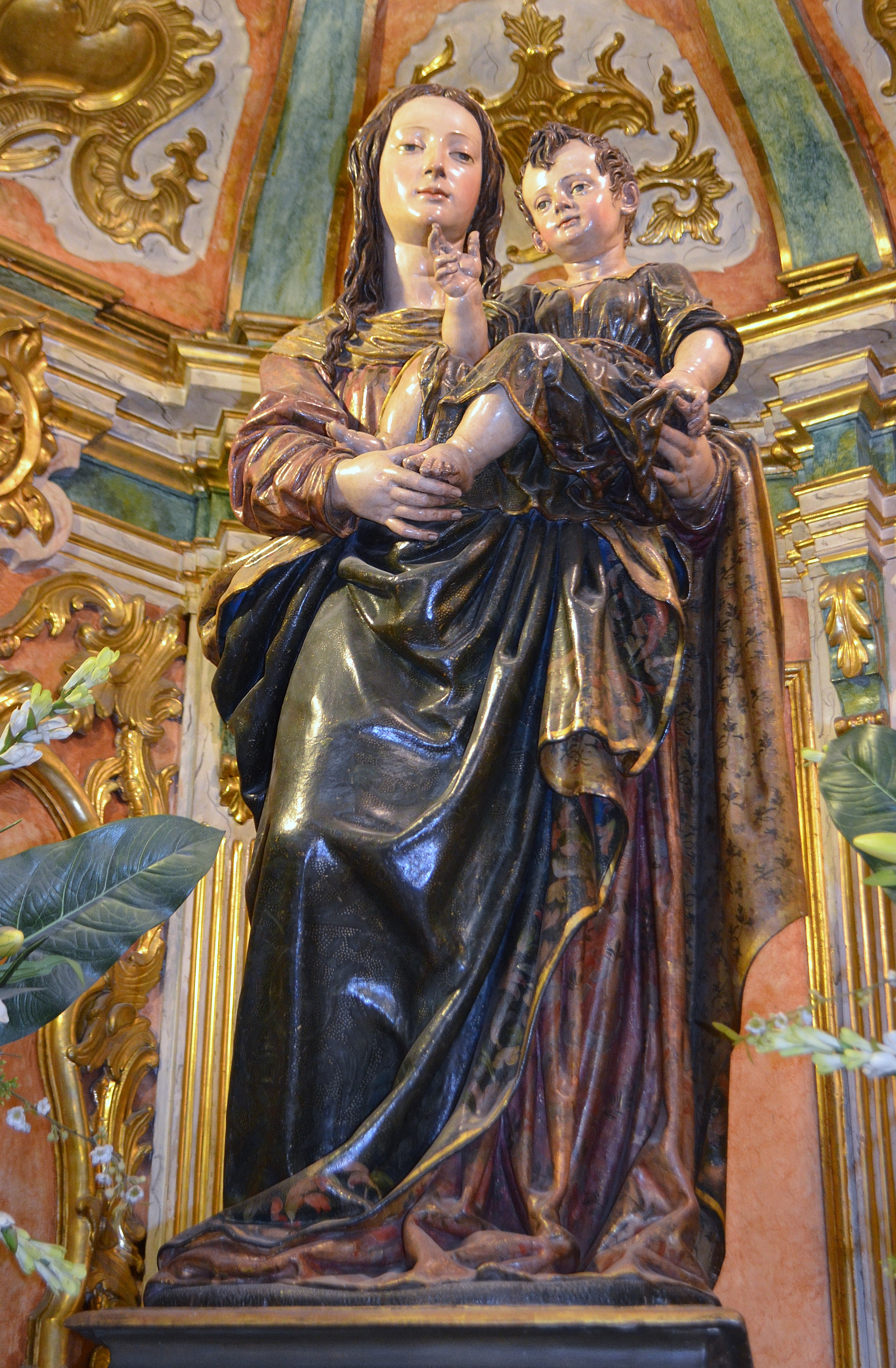 Virgen con el Niño, catedral de la Merced, Huelva, 1616, Juan Martínez Montañés.